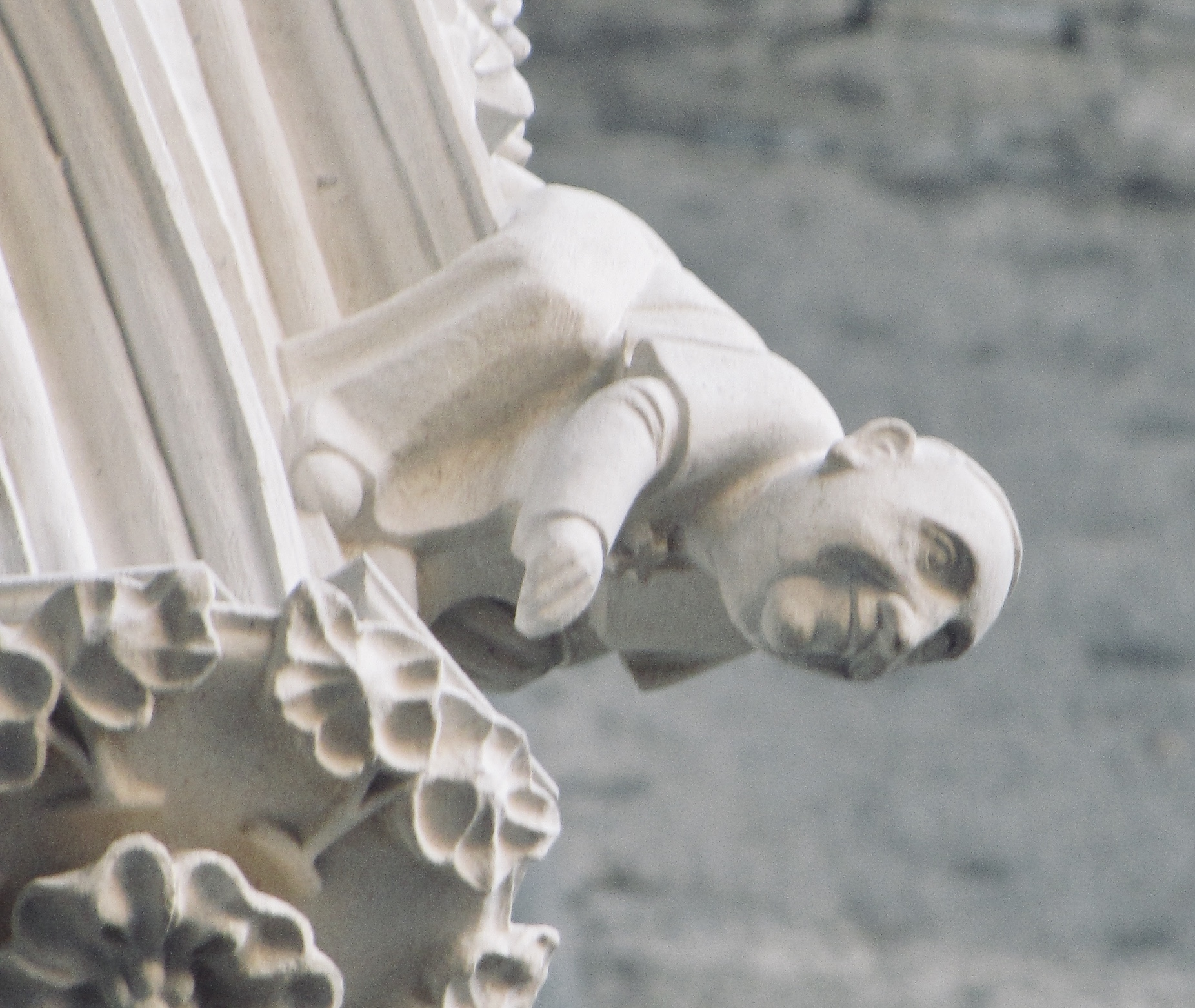 Kölner Dom: Figur mit den Gesichtszügen von Papst Franziskus. Moderne Steinmetzarbeit der Kölner Dombauhütte an einem neu gefertigten Baldachin über einer Statue am Mittelportal der Westfassade